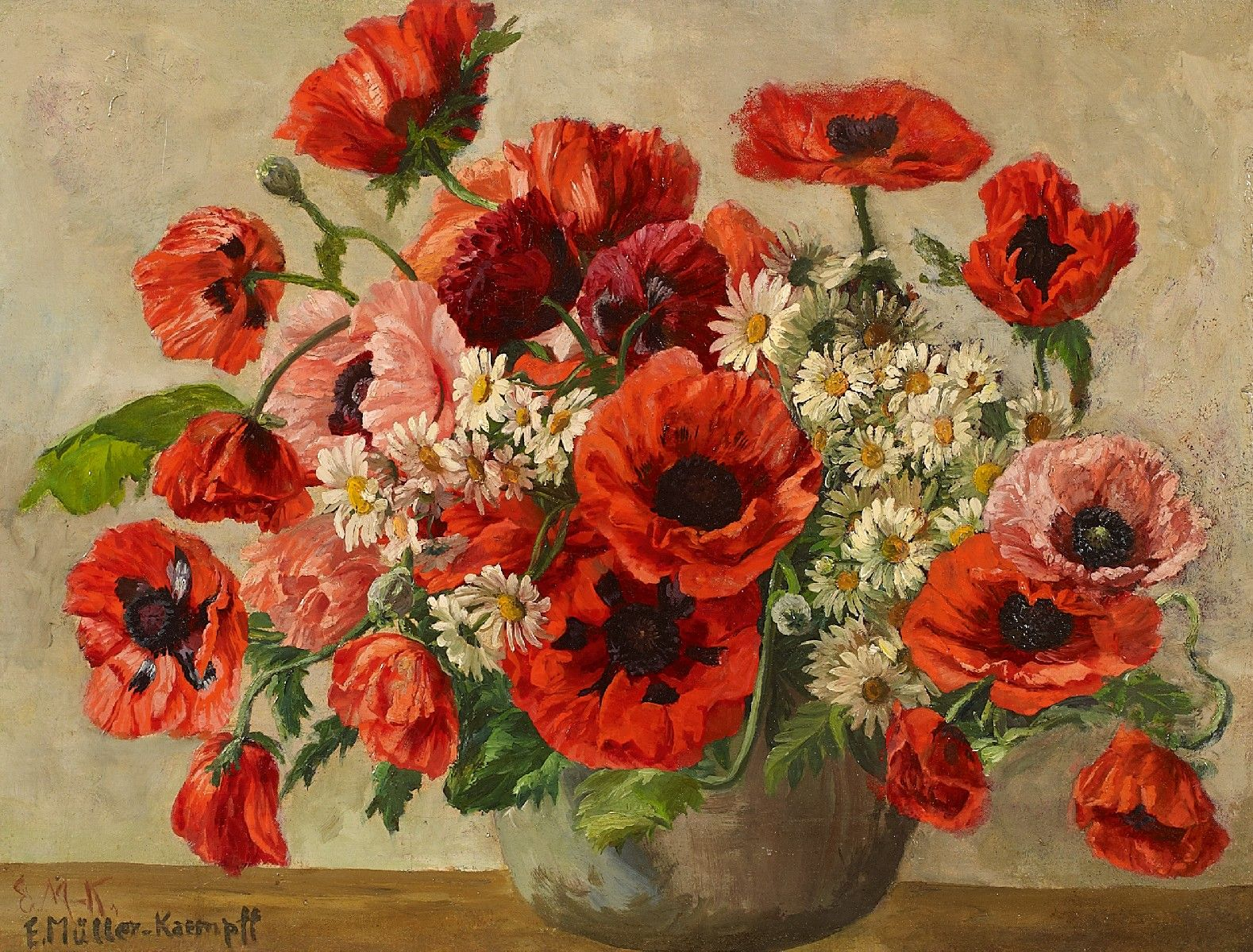 Blumenstrauß mit rotem Klatschmohn. Öl auf Leinwand. 60 x 80 cm